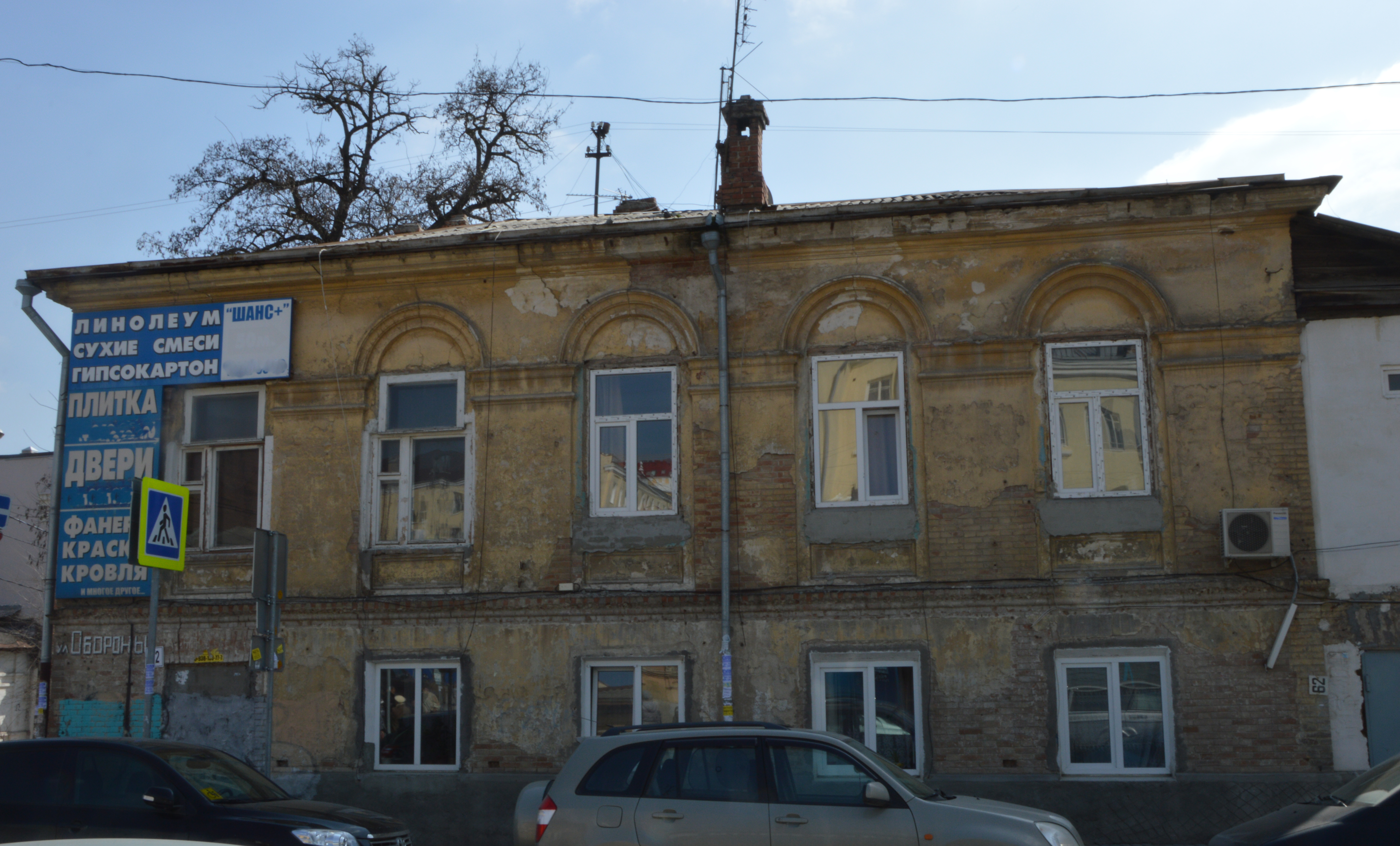 Здание города Ростова-на-Дону